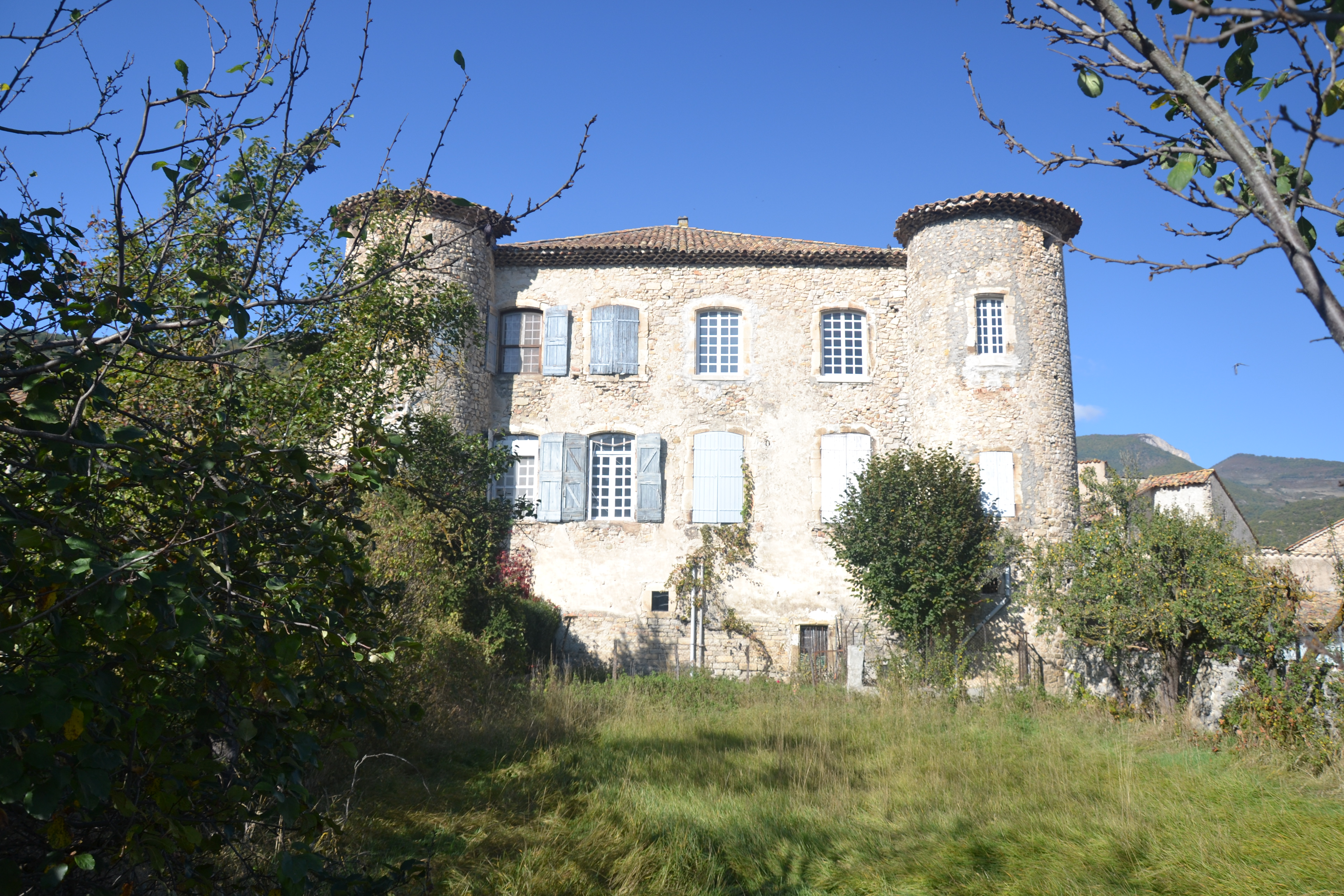 château de Lachau